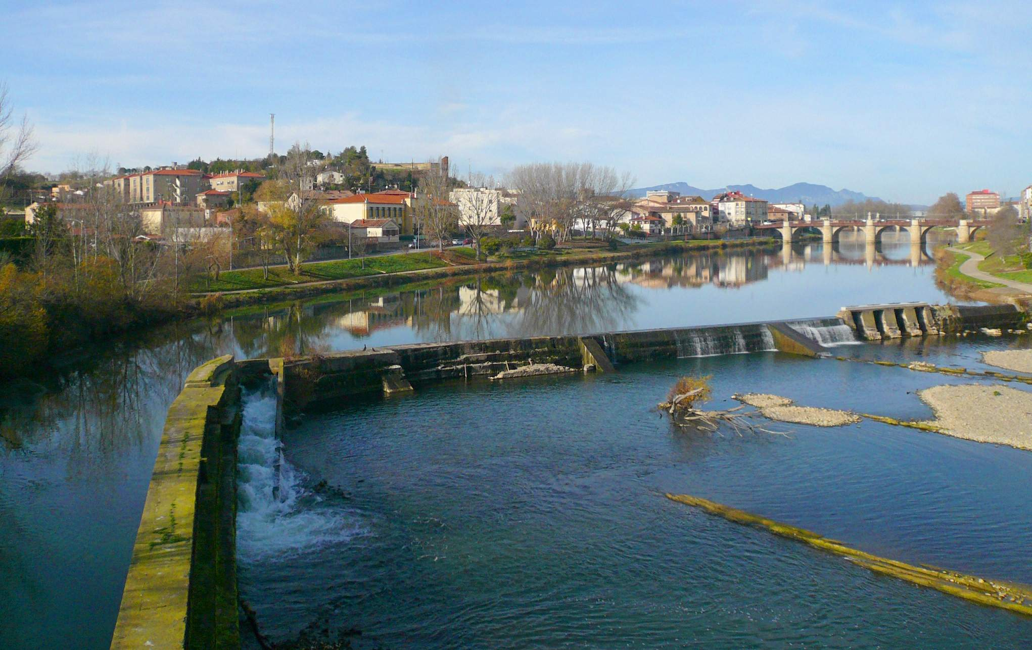 Miranda de Ebro (Burgos)